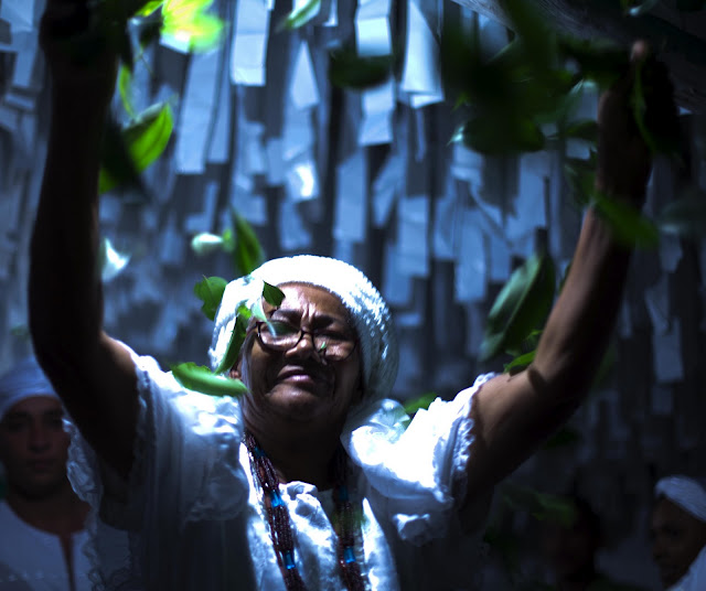 Essa foto foi tirada no Deká de Mãe Bárbara.